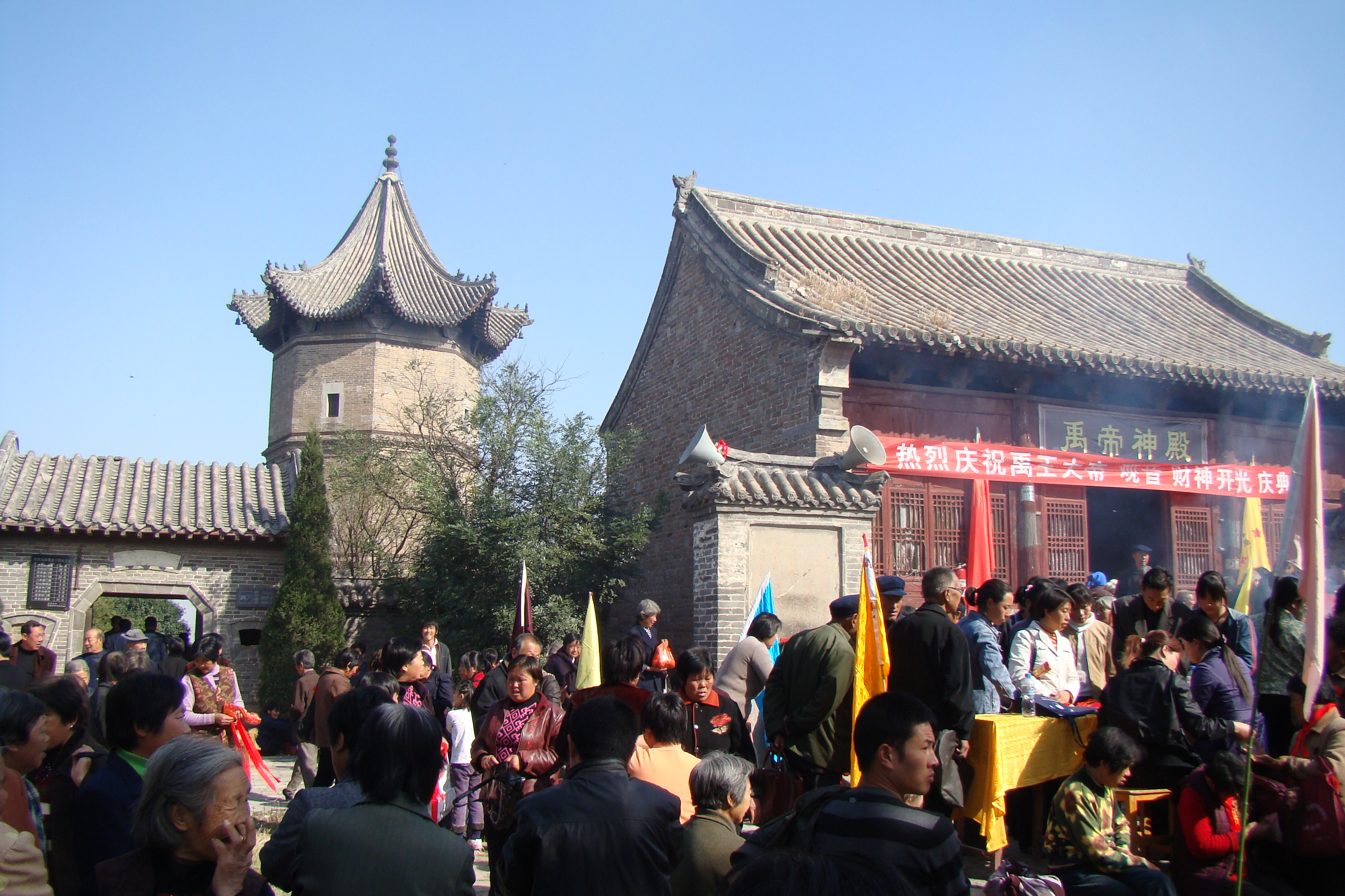 禹王大帝开光仪式